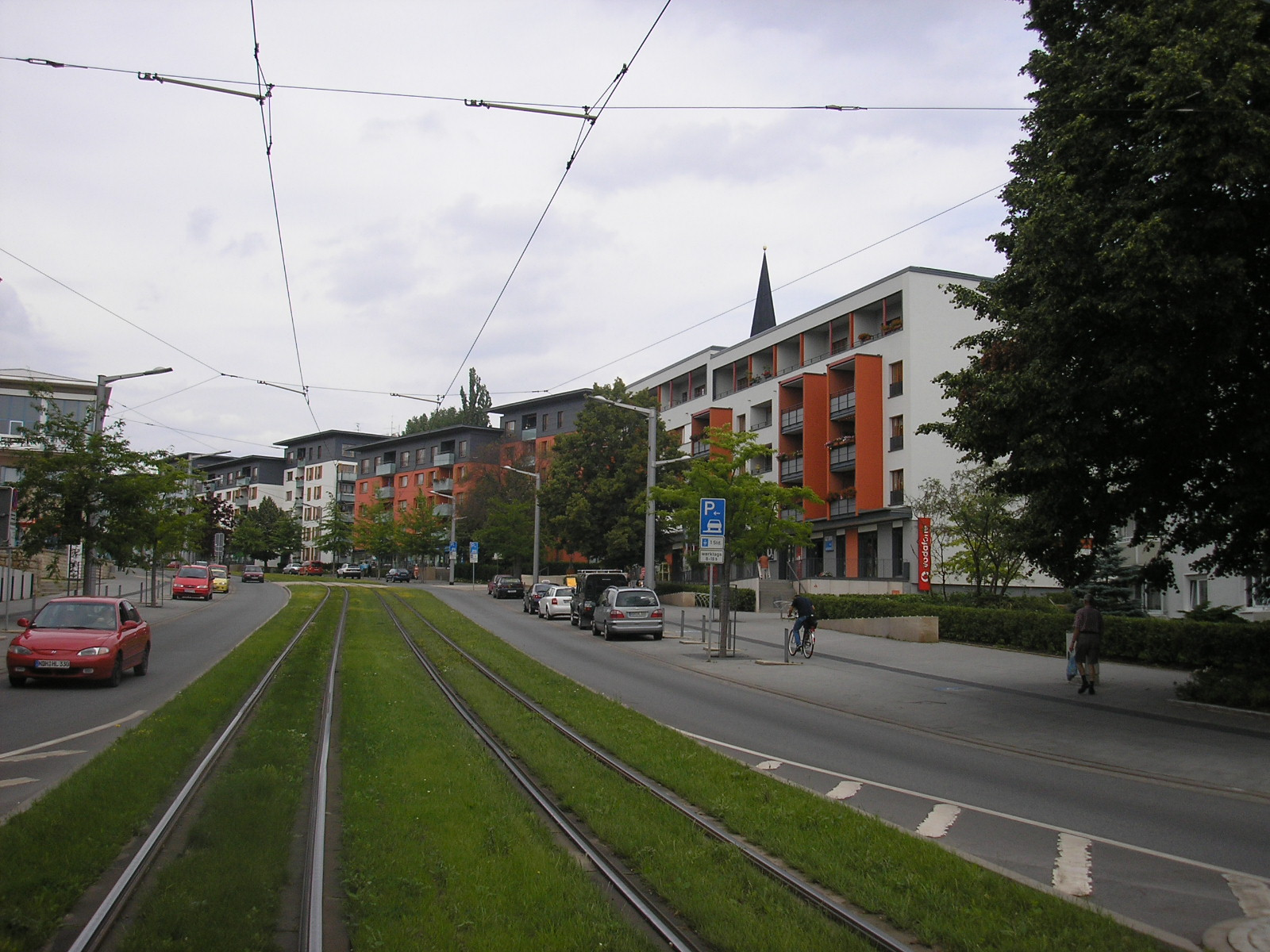 Blick durch die Rautenstraße in Richtung Innenstadt in Nordhausen (Thüringen).